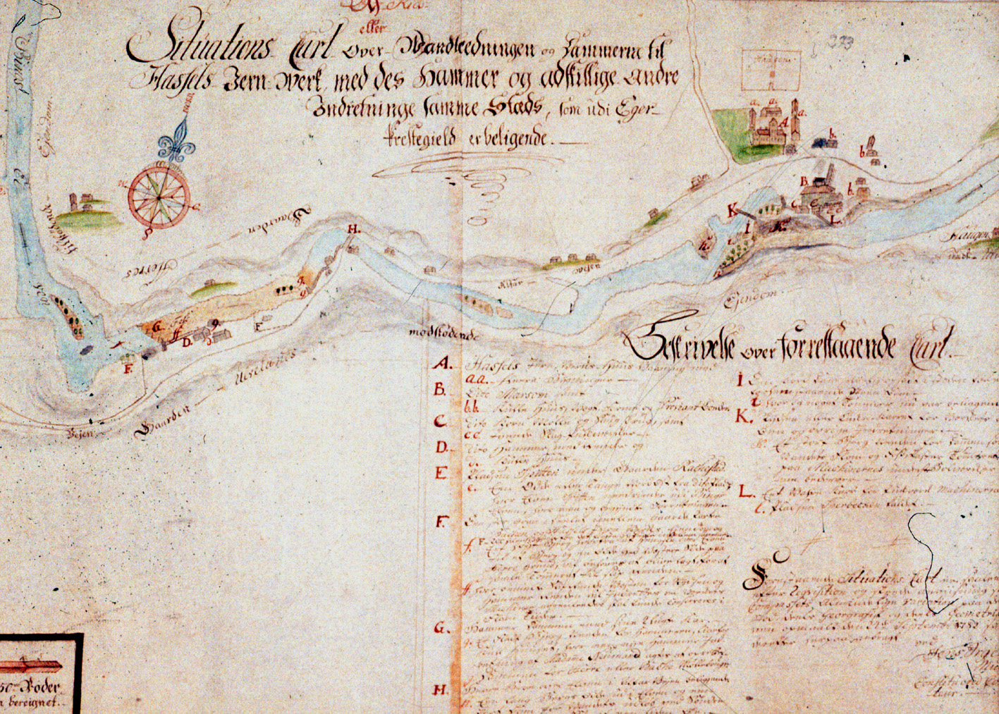 Karte der norwegischen Eisenhütte Hassel Verk von 1782